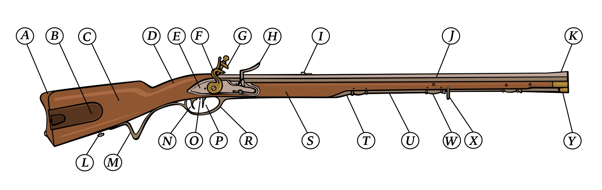 Sztucer kozienicki z Królewskiej Manufaktury Broni w Kozienicach 1790.